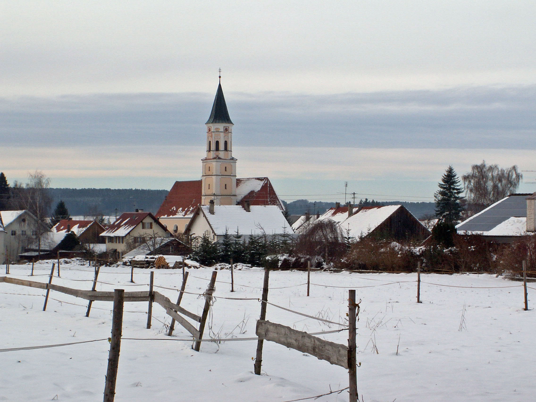 Oberrieden